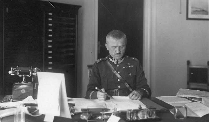 Ferdynand Zarzycki, pierwszy dowódca 8 pp. Leg.